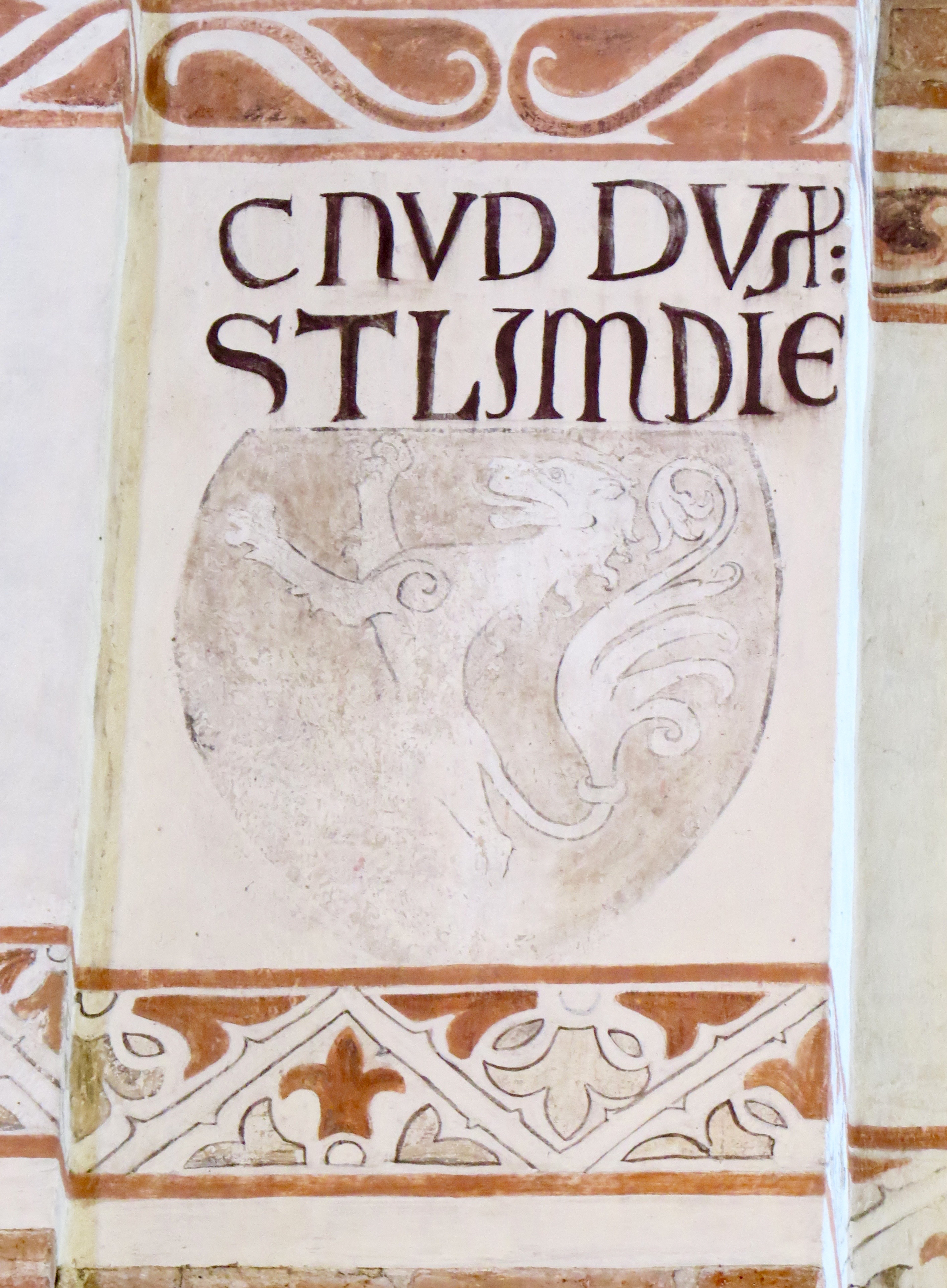 Hertug Knud af Estlands våben i Sankt Bendts Kirke, Ringsted, Sjælland